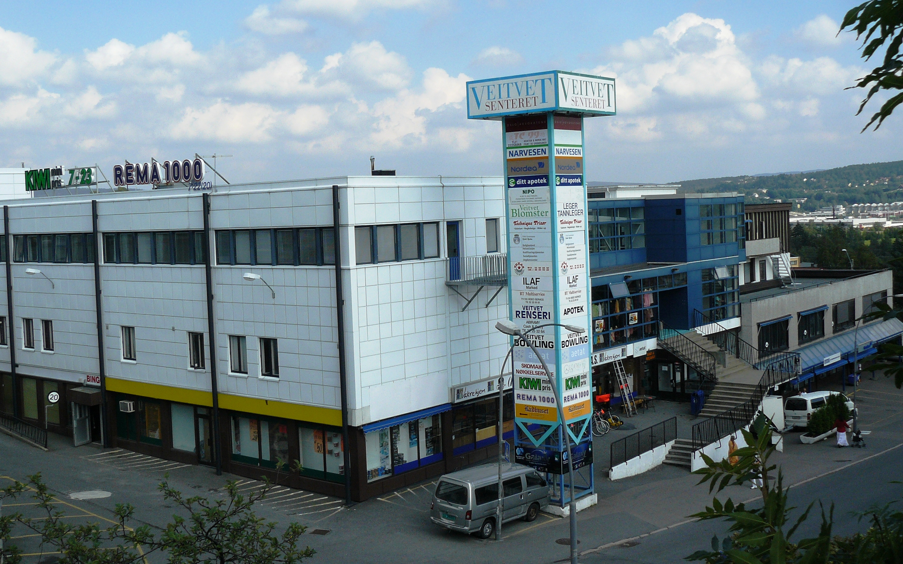 Veitvet senter, shoppingcentre in Oslo